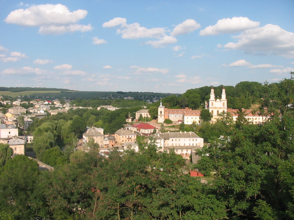 Buchach panorama, Ukraine